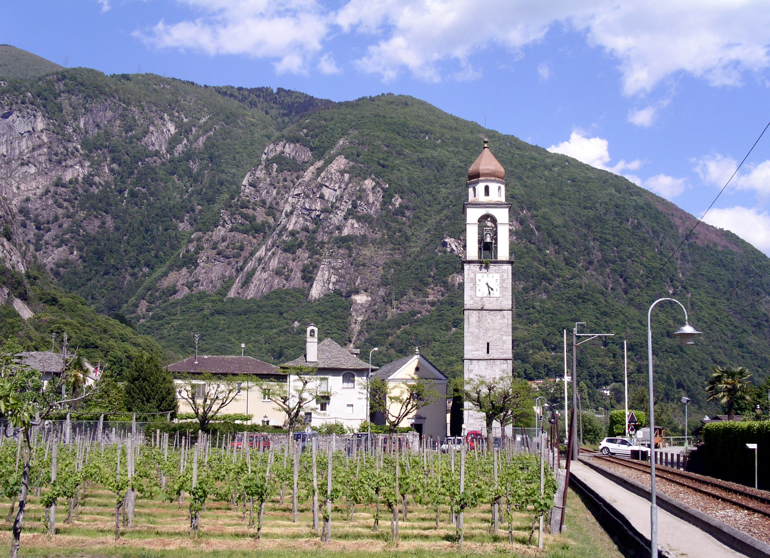 Kirche von Tegna, TI (Schweiz)